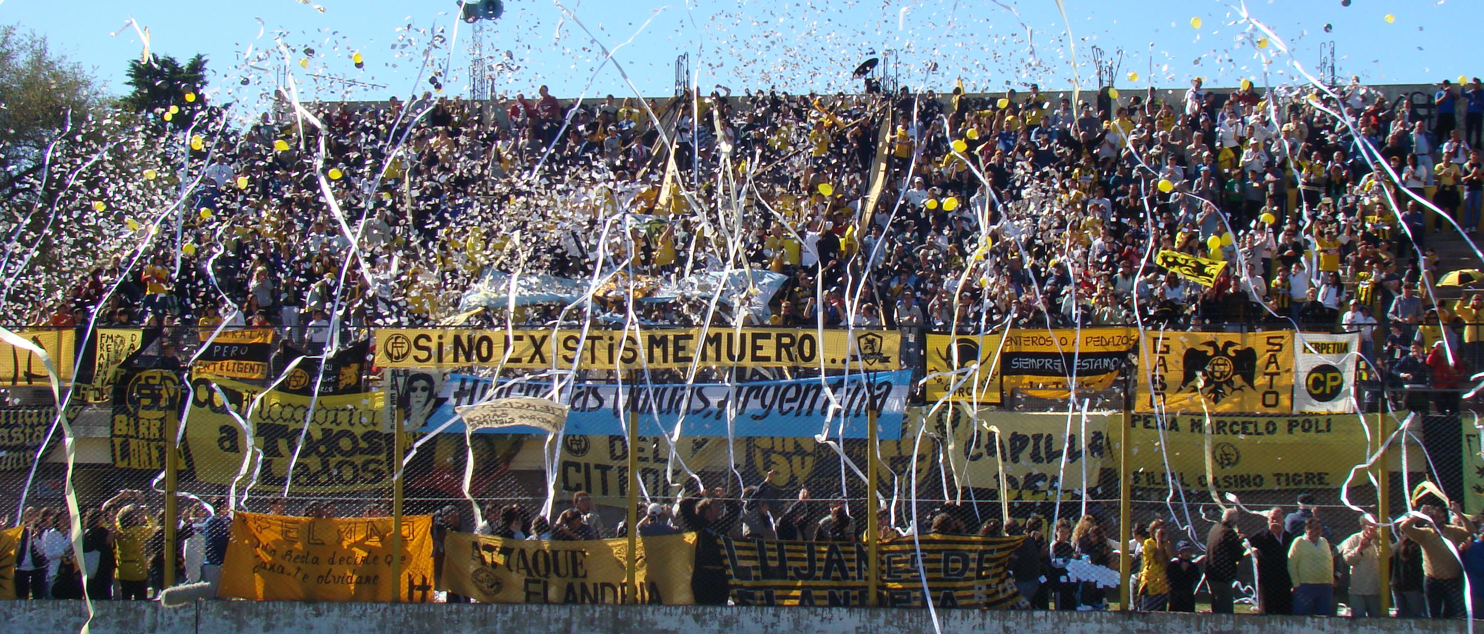 8 de MAyo de 2010 - Estadio Carlos V en el momento que el primer equipo de Flandria salta al campo de juego para enfrentar a Sarmiento de Junín.